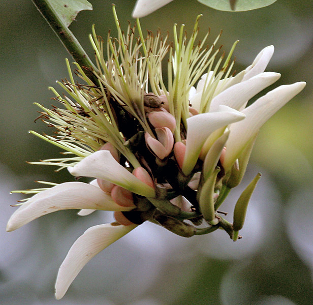 Indian Coral Tree Erythrina variegata var. alba in Kolkata, West Bengal, India.